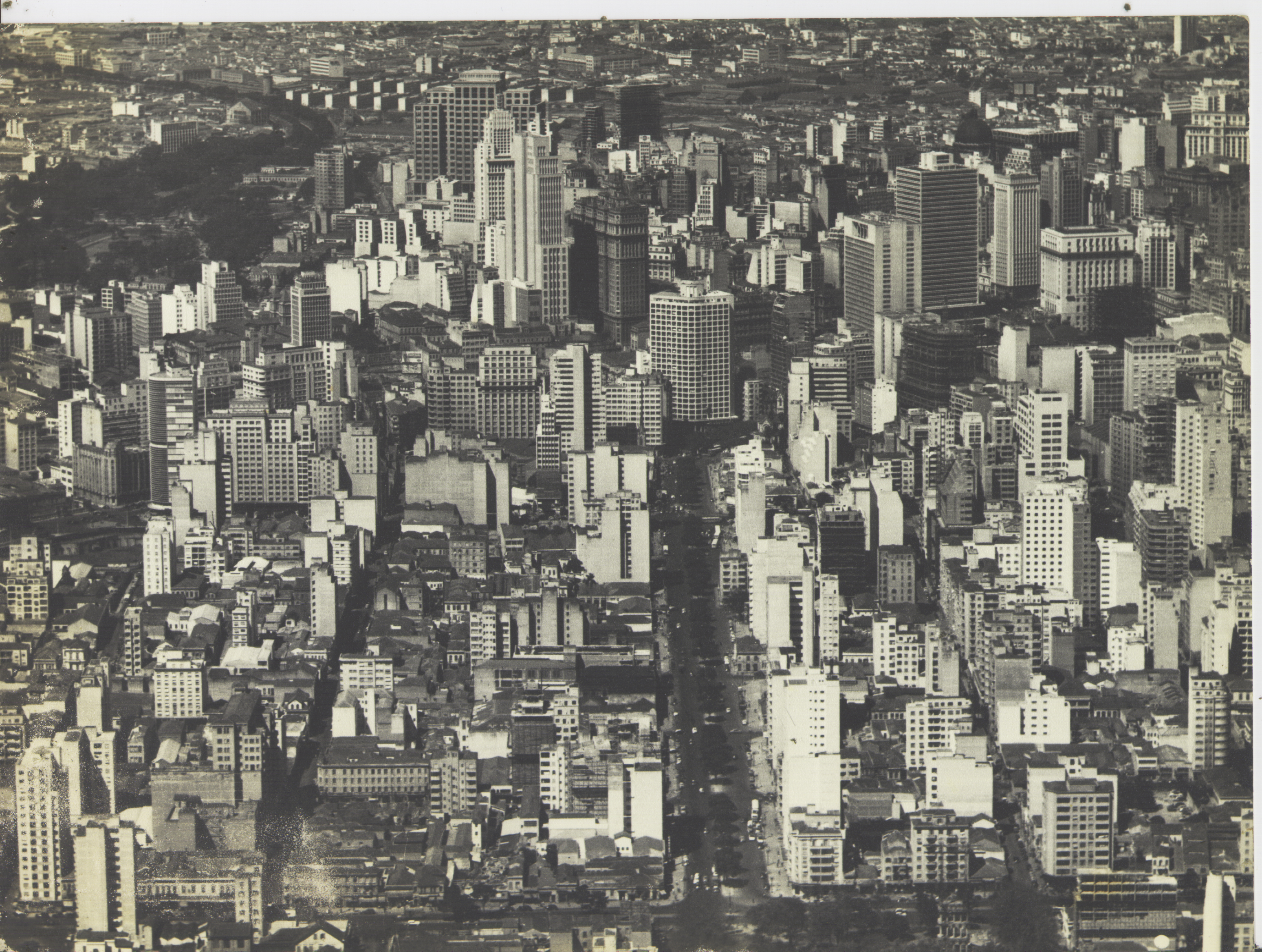 Obra que integra o acervo do Museu Paulista da USP. Coleção Werner Haberkorn